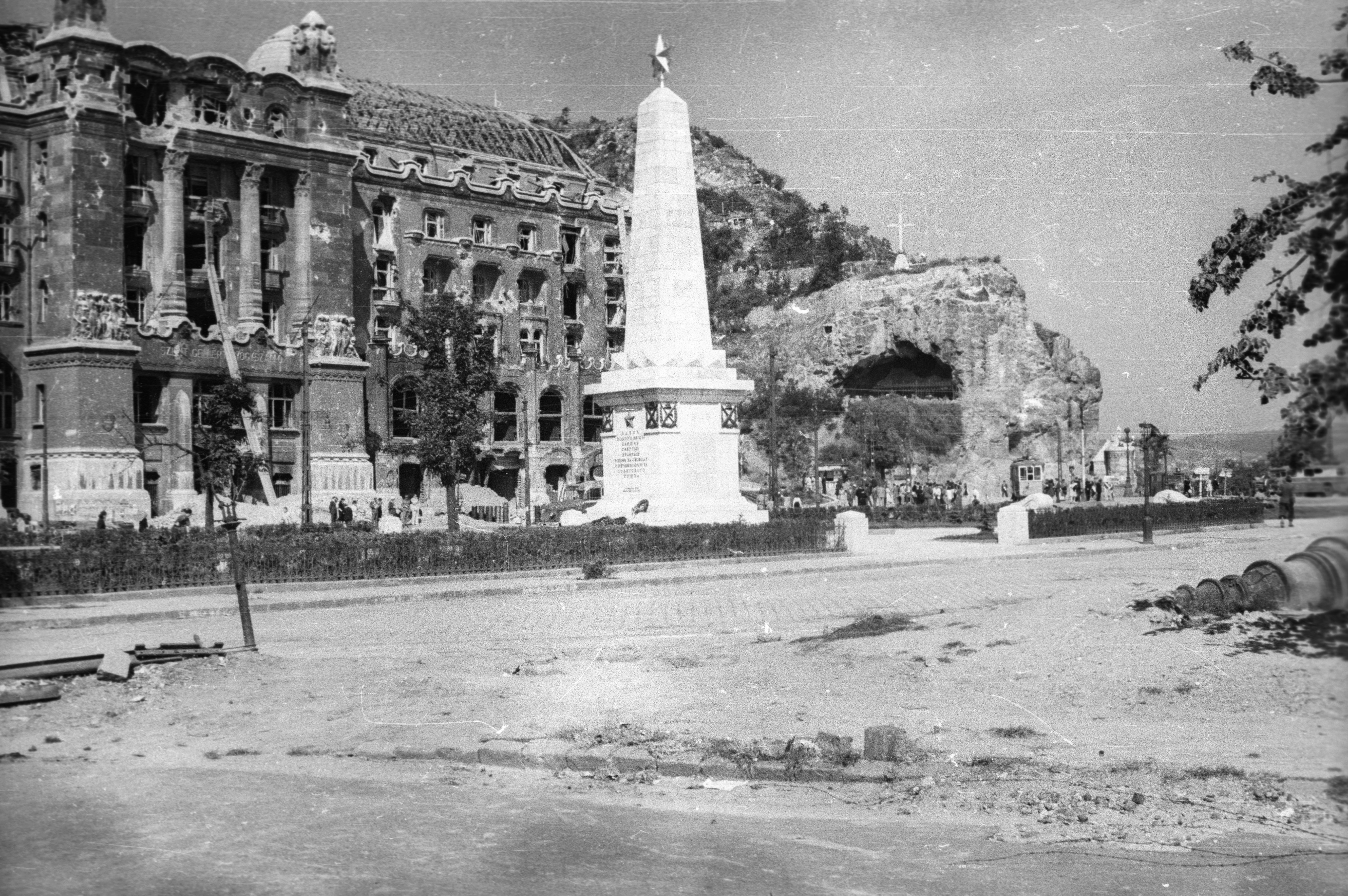 Vörös Csillag és Kereszt. A Szent Gellért tér 1945-ben